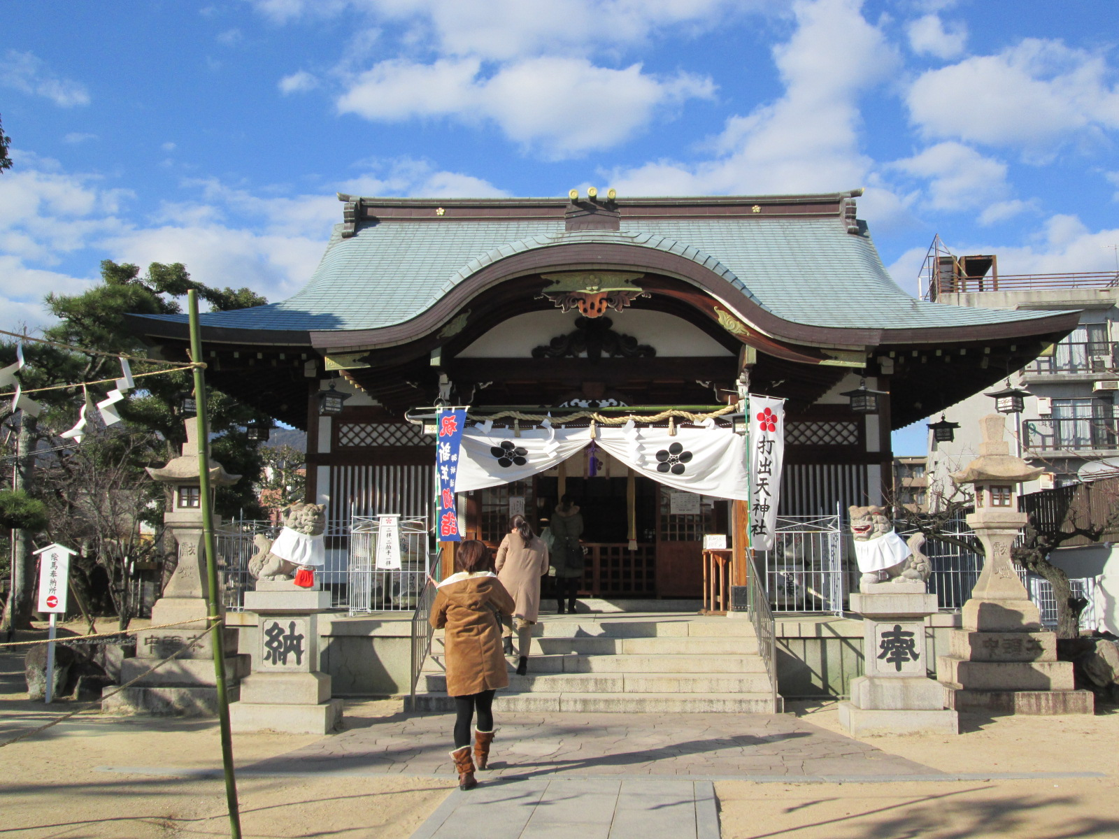 本殿を910MoLT自身が撮影